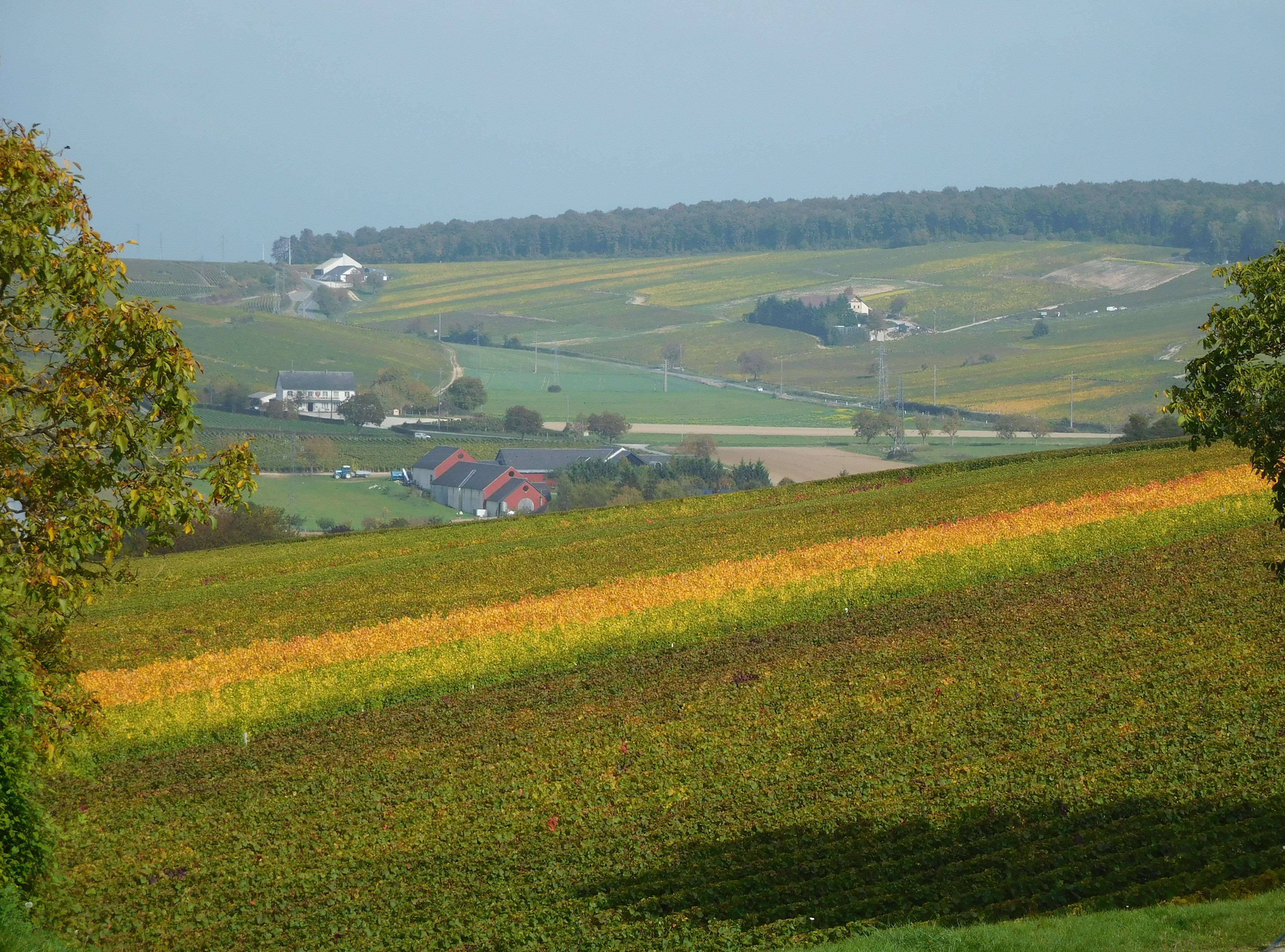 Depuis le coteau près de l'entrée des Caves de la Mignonne (Sancerre, Cher, Centre-Val de Loire, France), vue du lieu-dit Chaudoux (au nord) dans le Sancerrois.